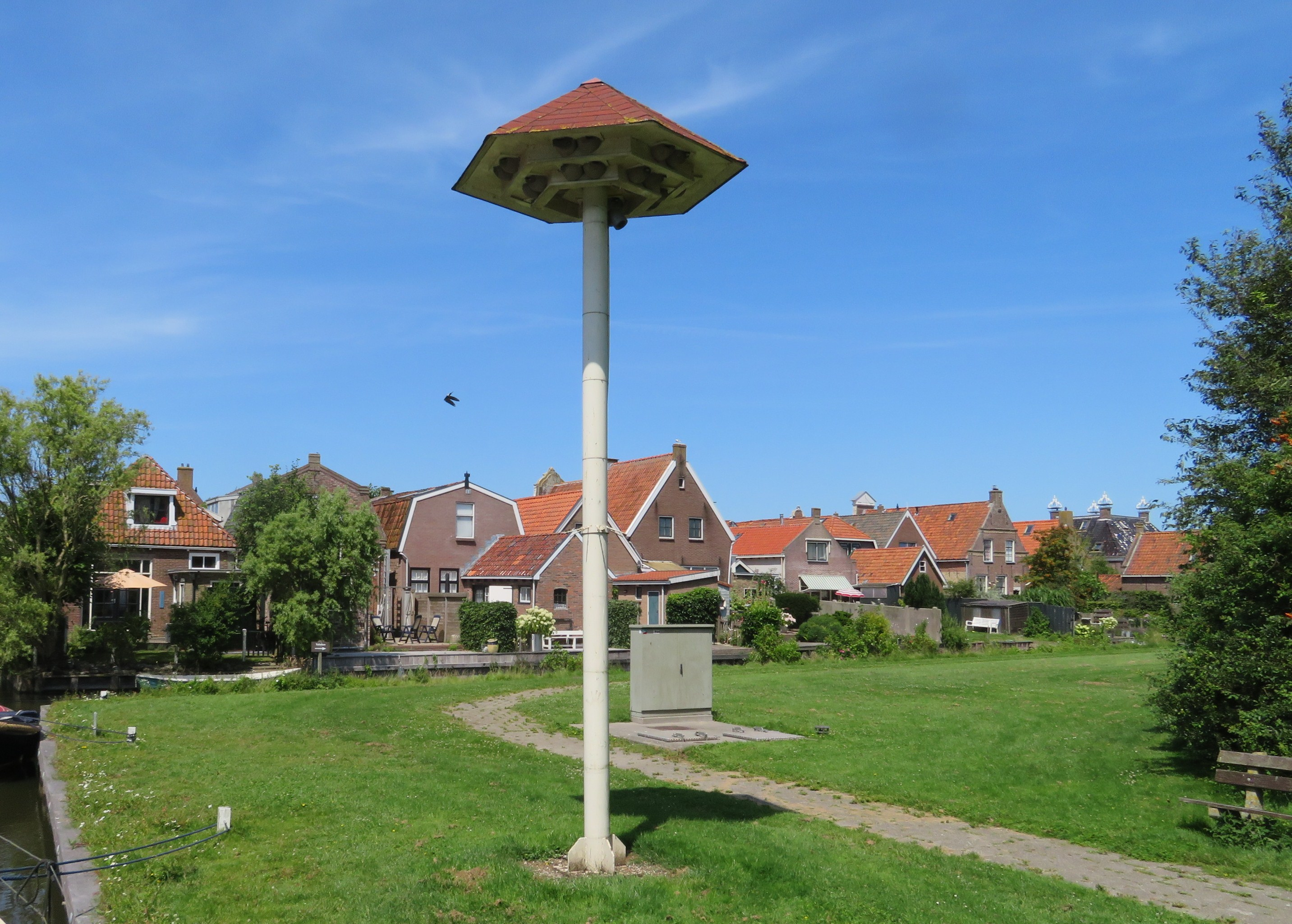 Eén van een rij zwaluwnesten in Hindeloopen